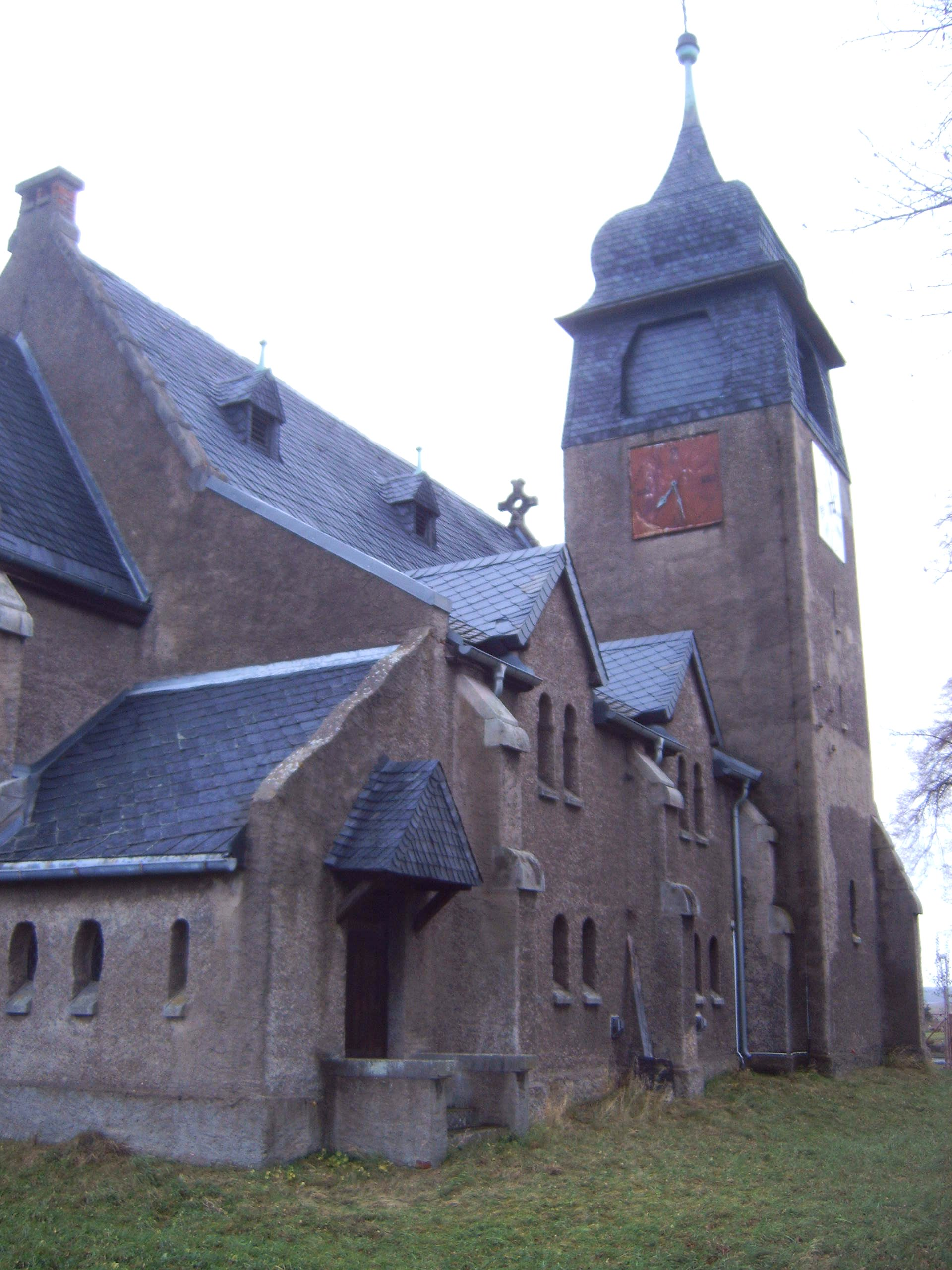 Dorfkirche Dolle, Sachsen-Anhalt, Blick von Südwesten